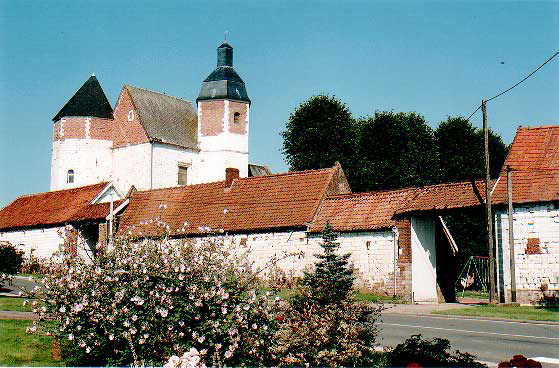 Le manoir de Penin